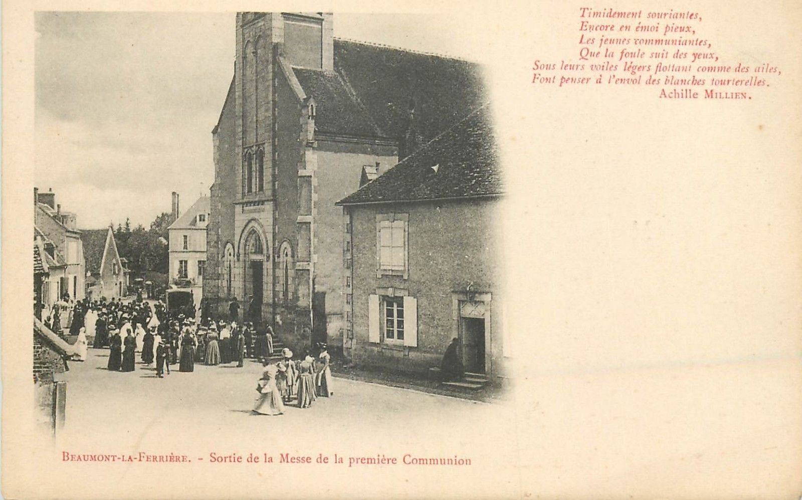 L'église Saint-Léger de Beaumont-la-Ferrière, vers 1905. Sortie de la première communion.